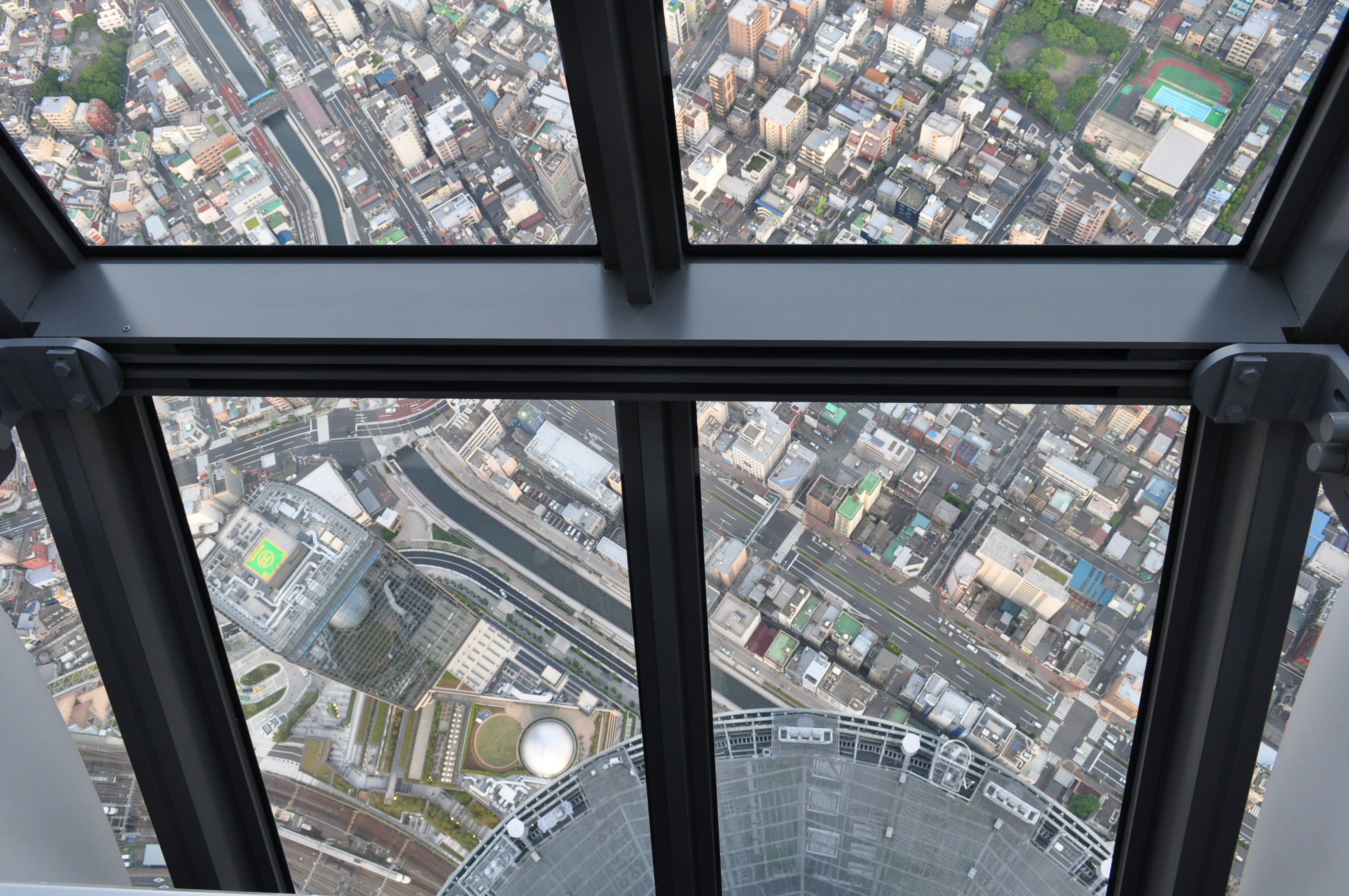 展望回廊から真下を見ました、一番怖かったです。